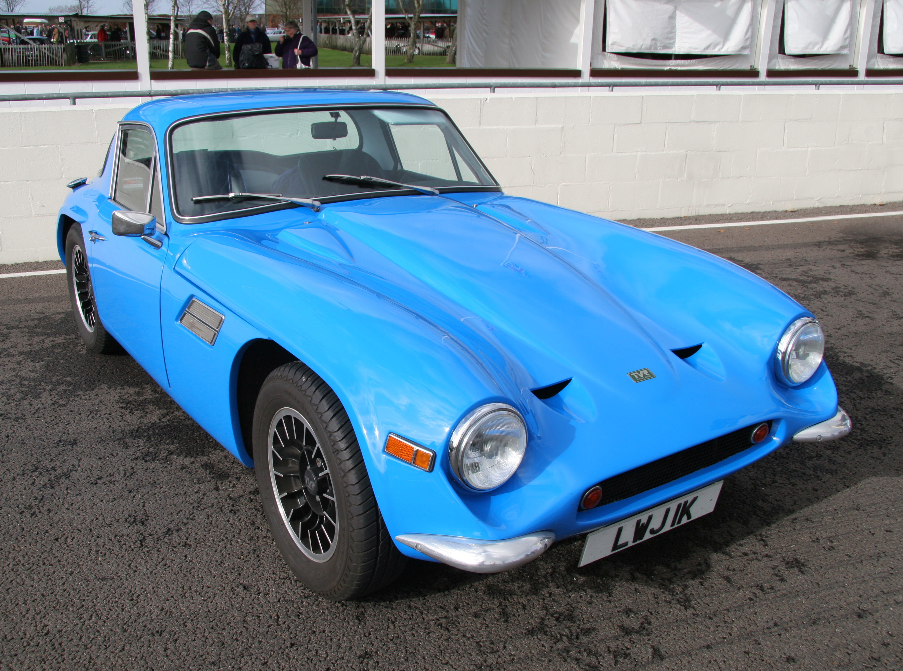 TVR Vixen S3